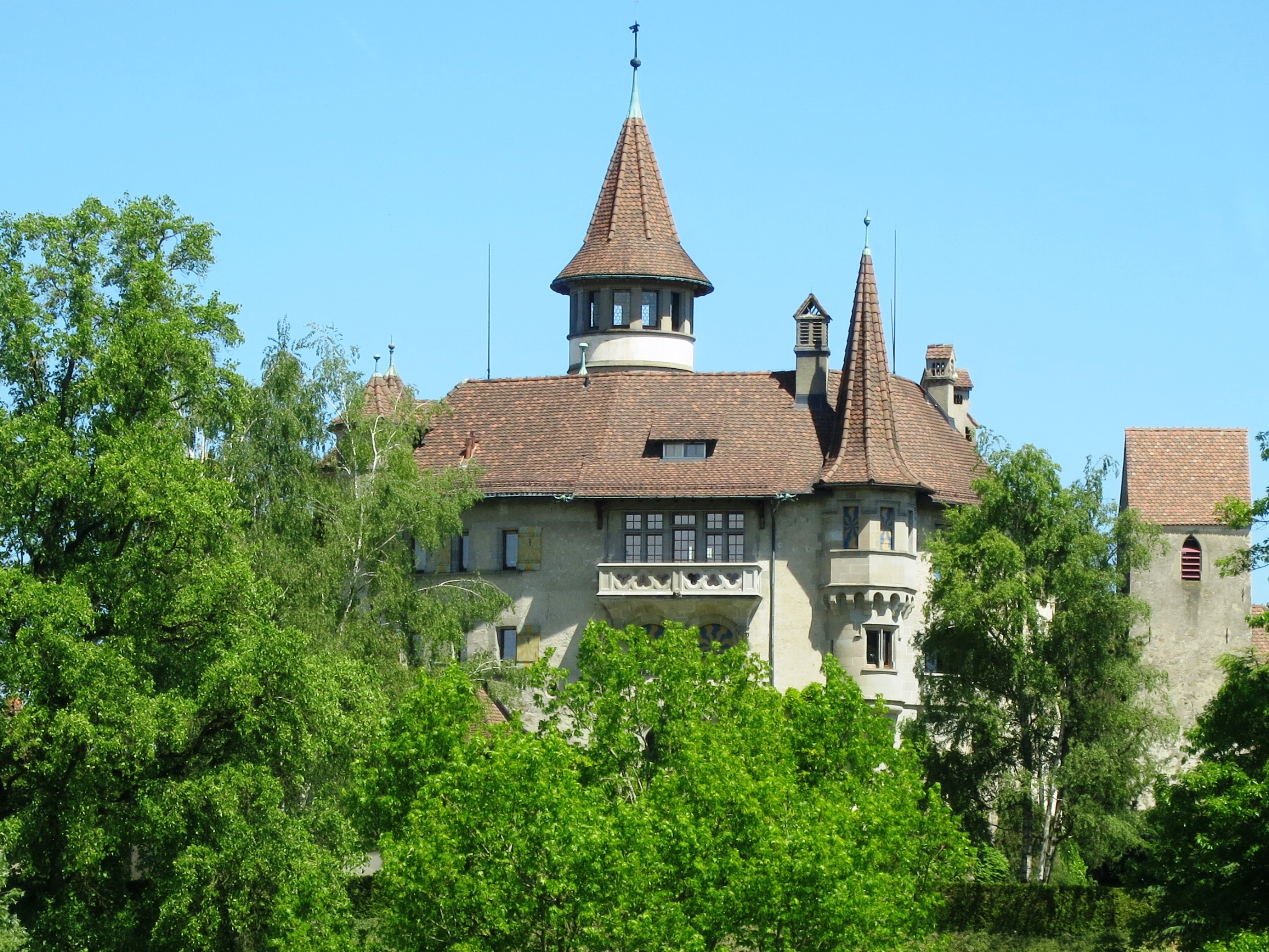 Schloss St. Andreas, Cham ZG, Schweiz